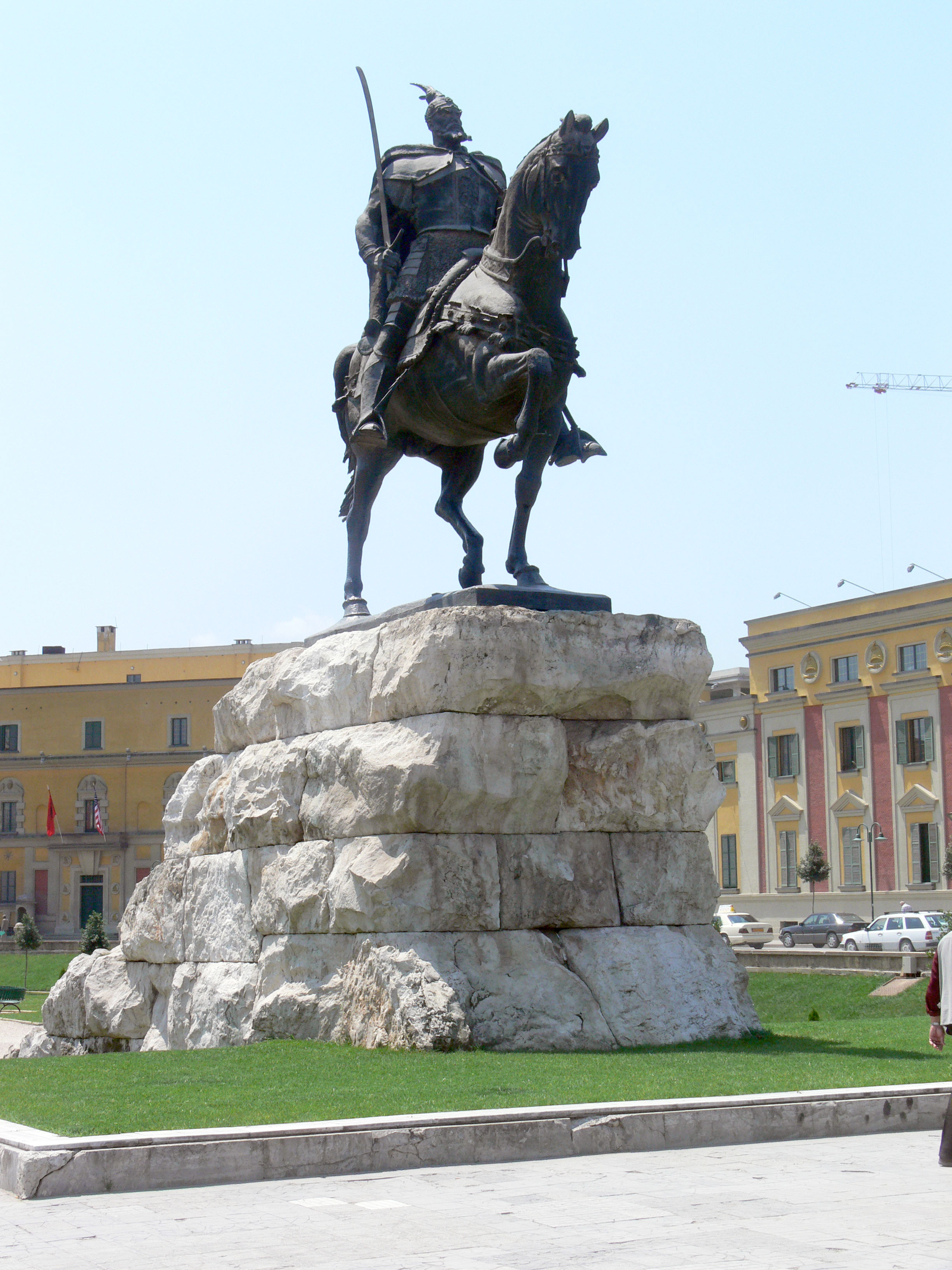 Albanisches Heldengedenken: Reiterstatue Skanderbegs in Tirana